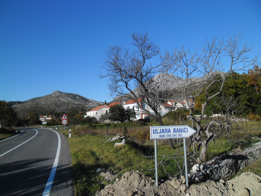 selo Banići, Dubrovačko primorje